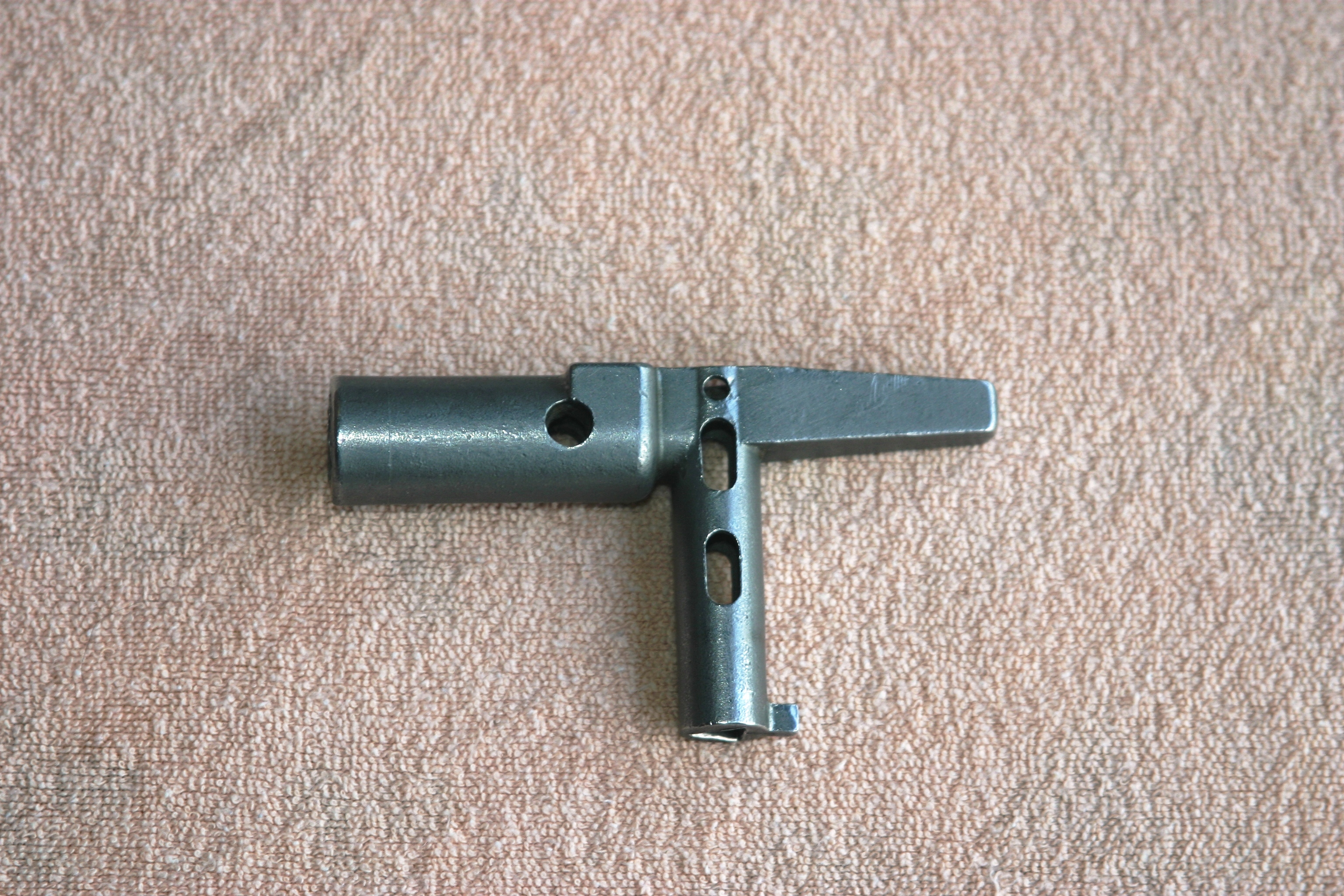 Combischlëssel vun den Nederlandse Spoorwegen.